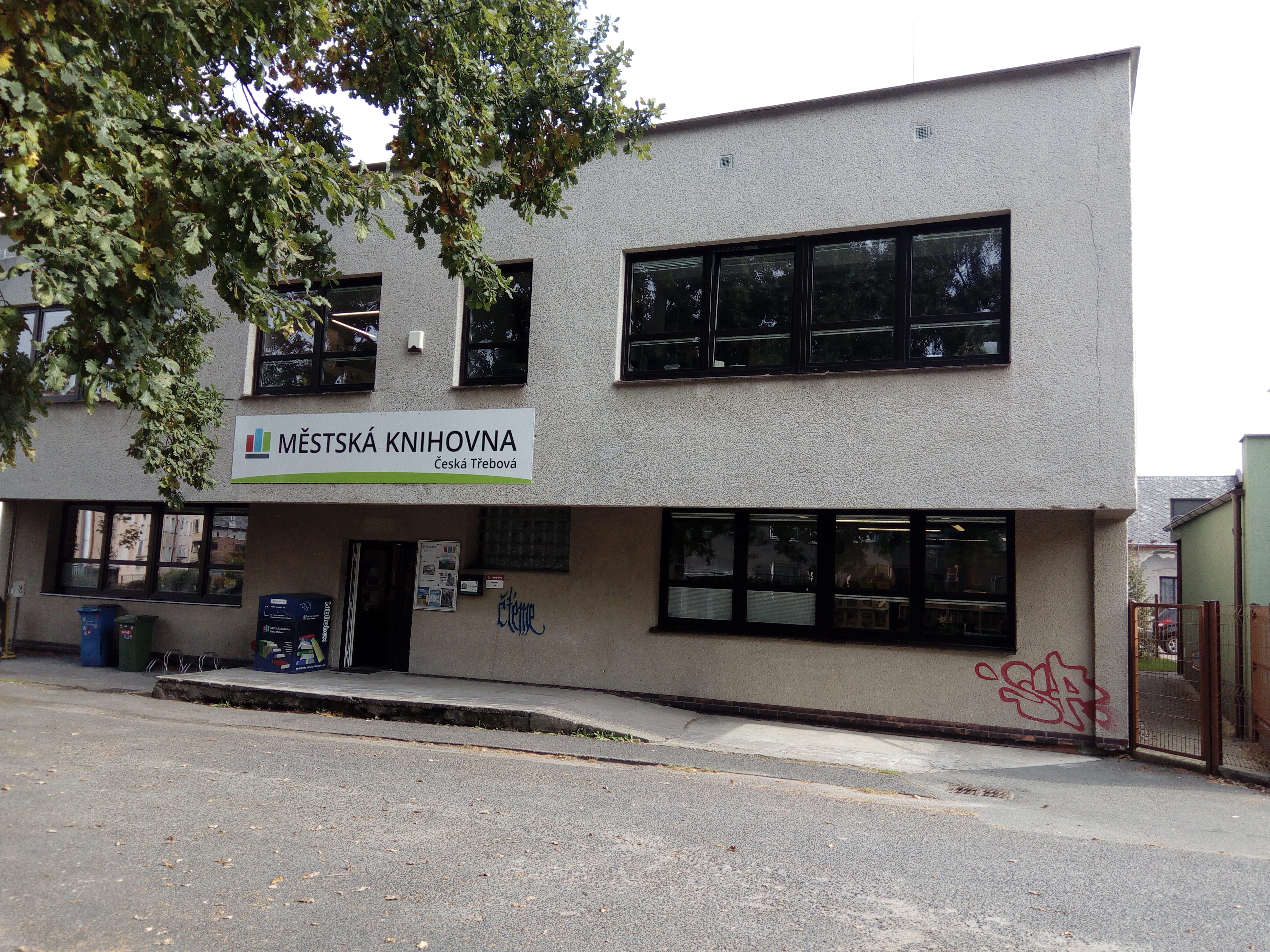 Knihovna na adrese Smetanova 173, Česká Třebová.